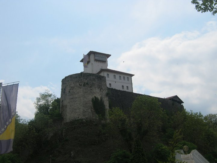 Kula Husein-kapetana Gradaščevića u Gradačcu